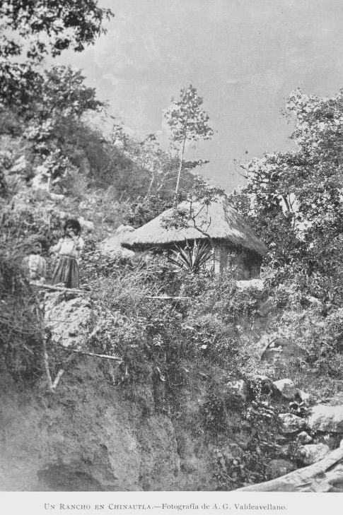 Rancho indígena en Chinautla, Guatemala, en 1897.